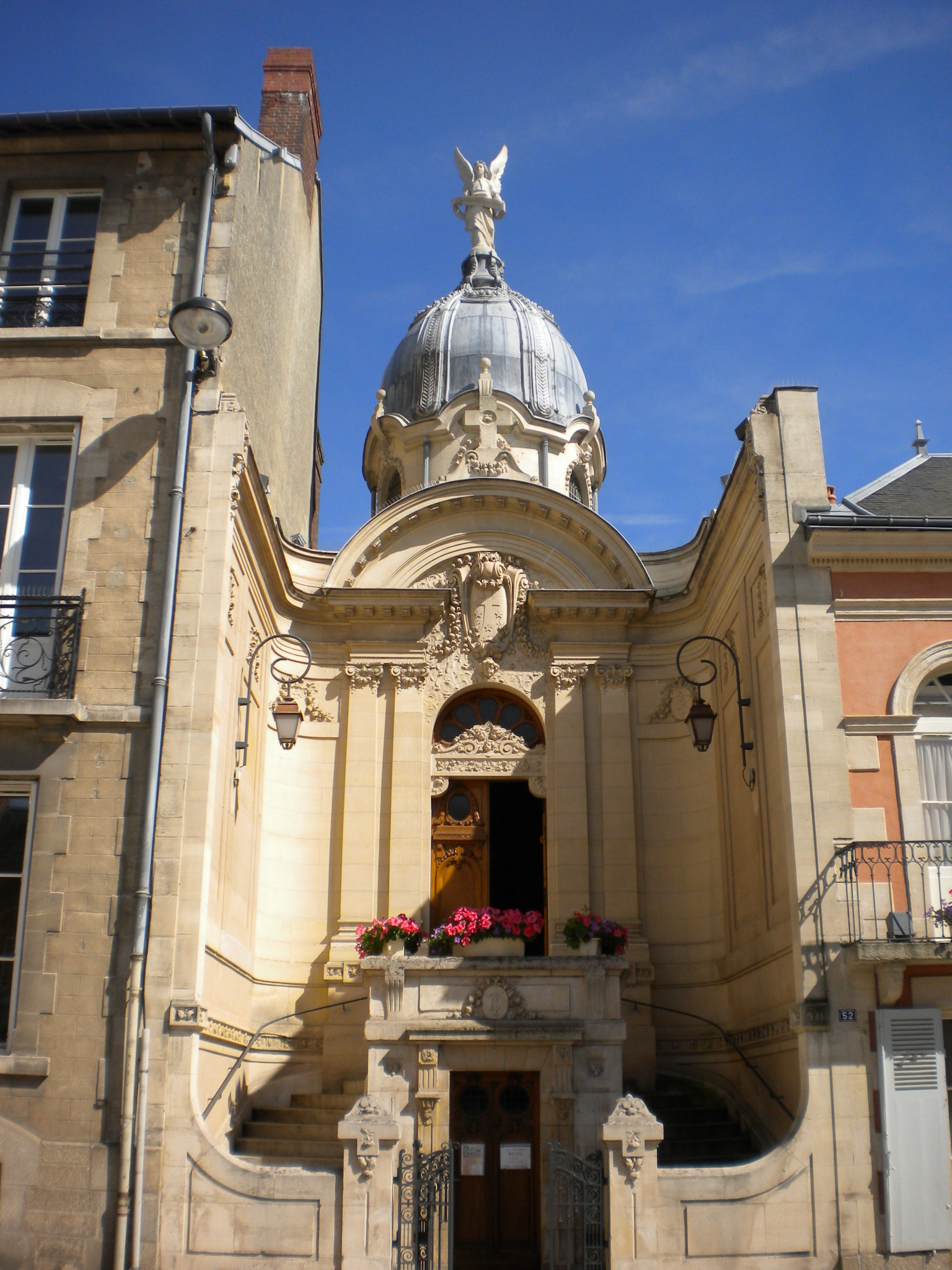 Alençon, Maison natale de sainte Thérèse de l'enfant-Jésus et chapelle